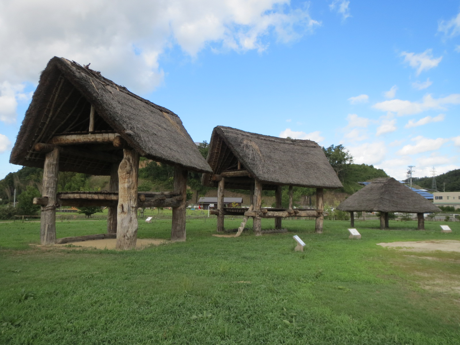 福島市にある宮畑遺跡